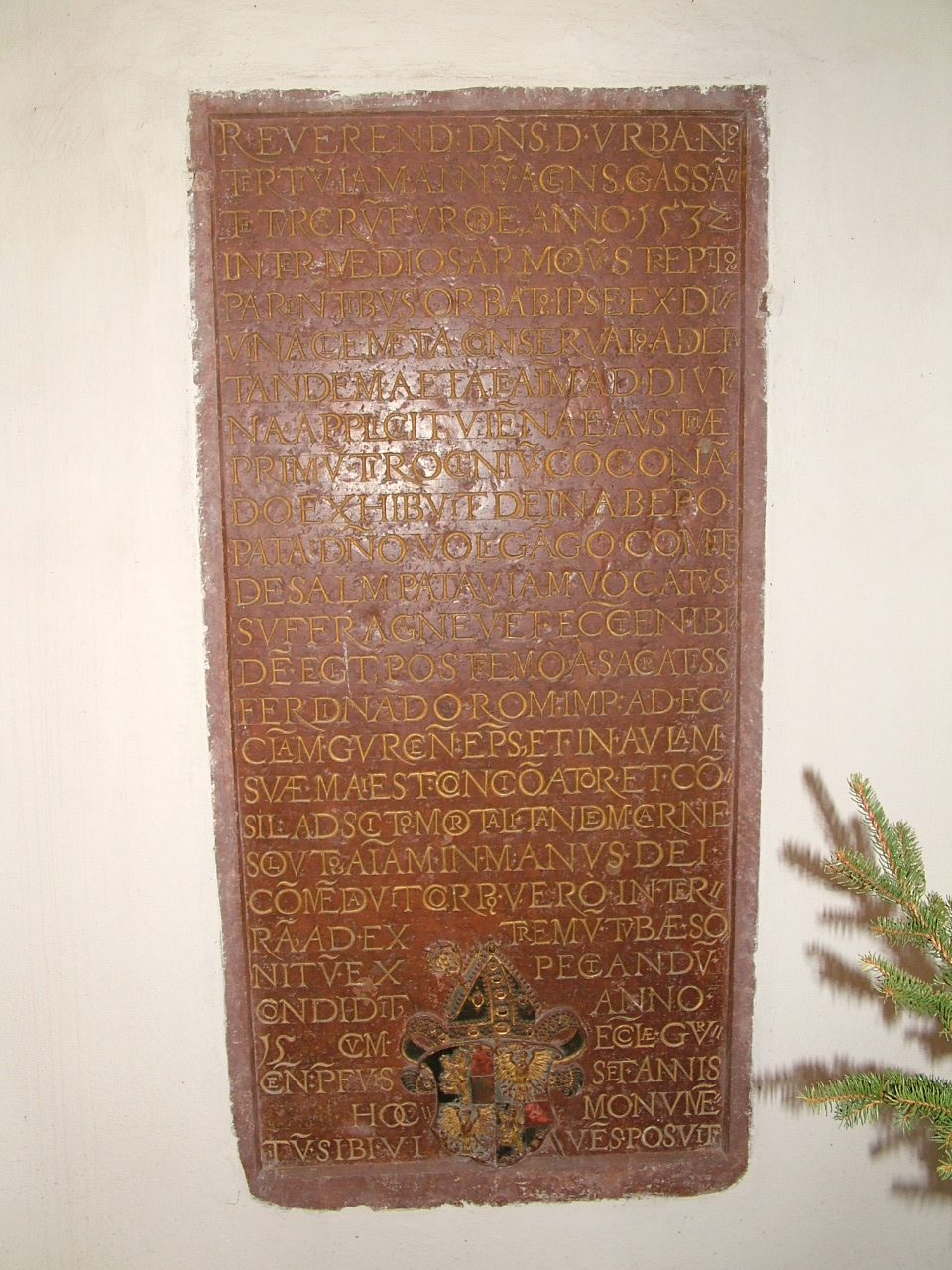 Grab Bischof Sagstetter